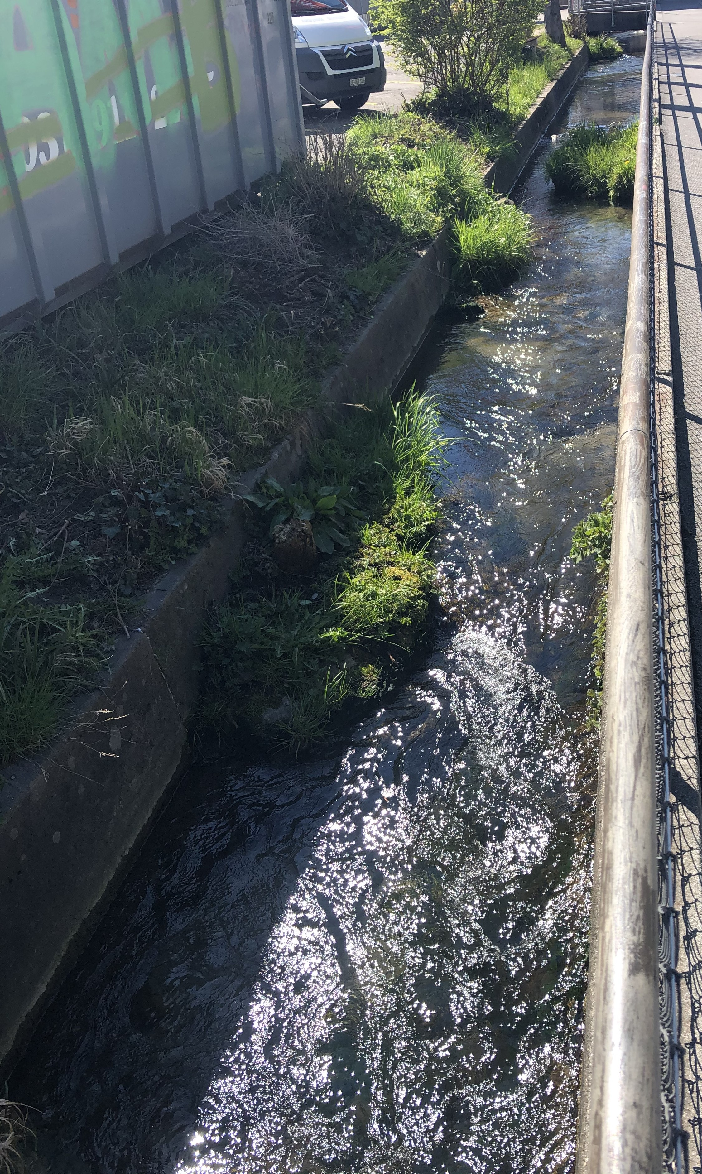 Blumenfeld Stadtbach